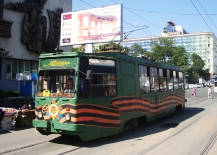 Трамвай ЛМ-93 во Владивостоке